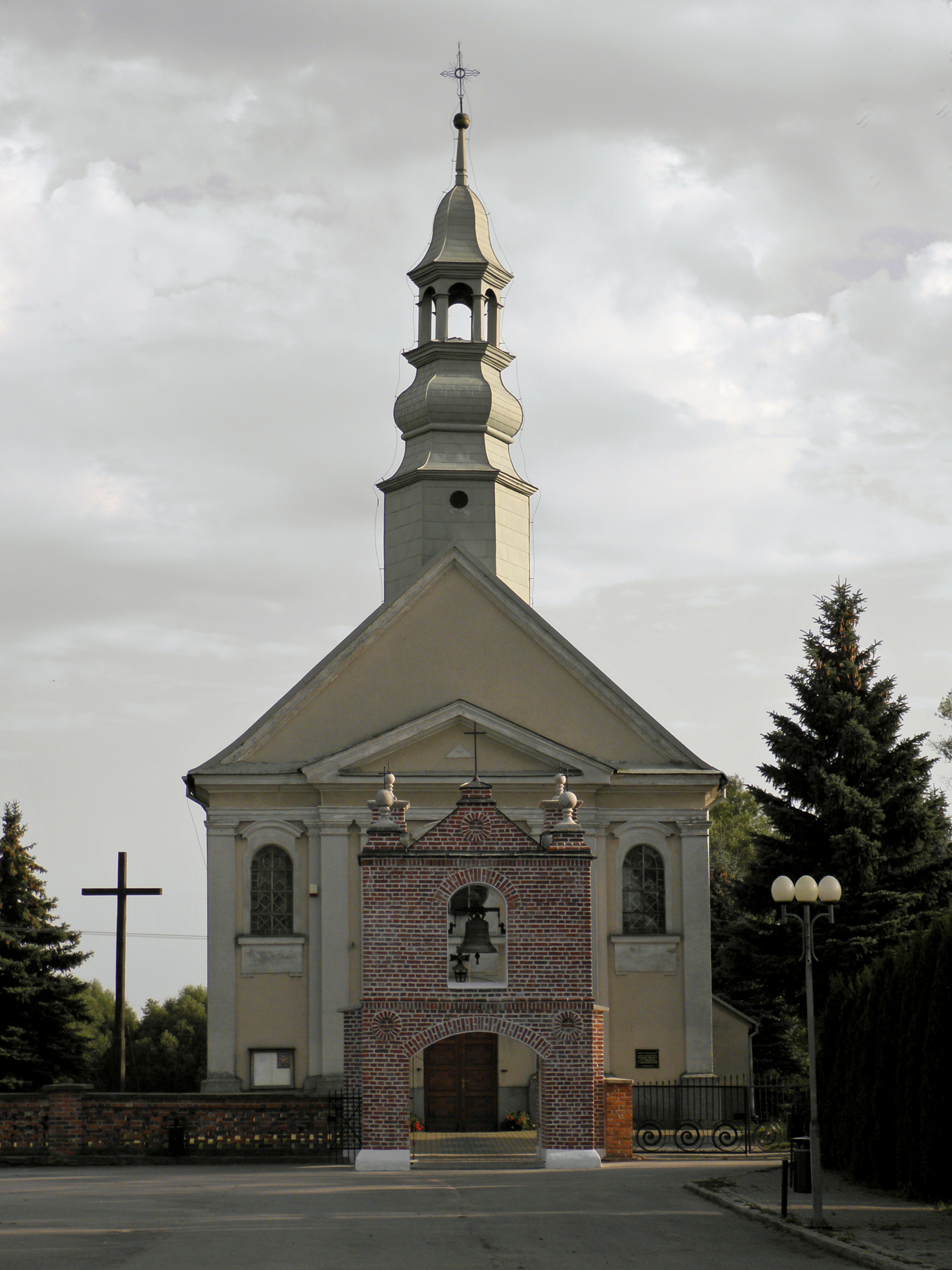 Jankowice - kościół św. Mikołaja (zabytek nr 487/A/57)